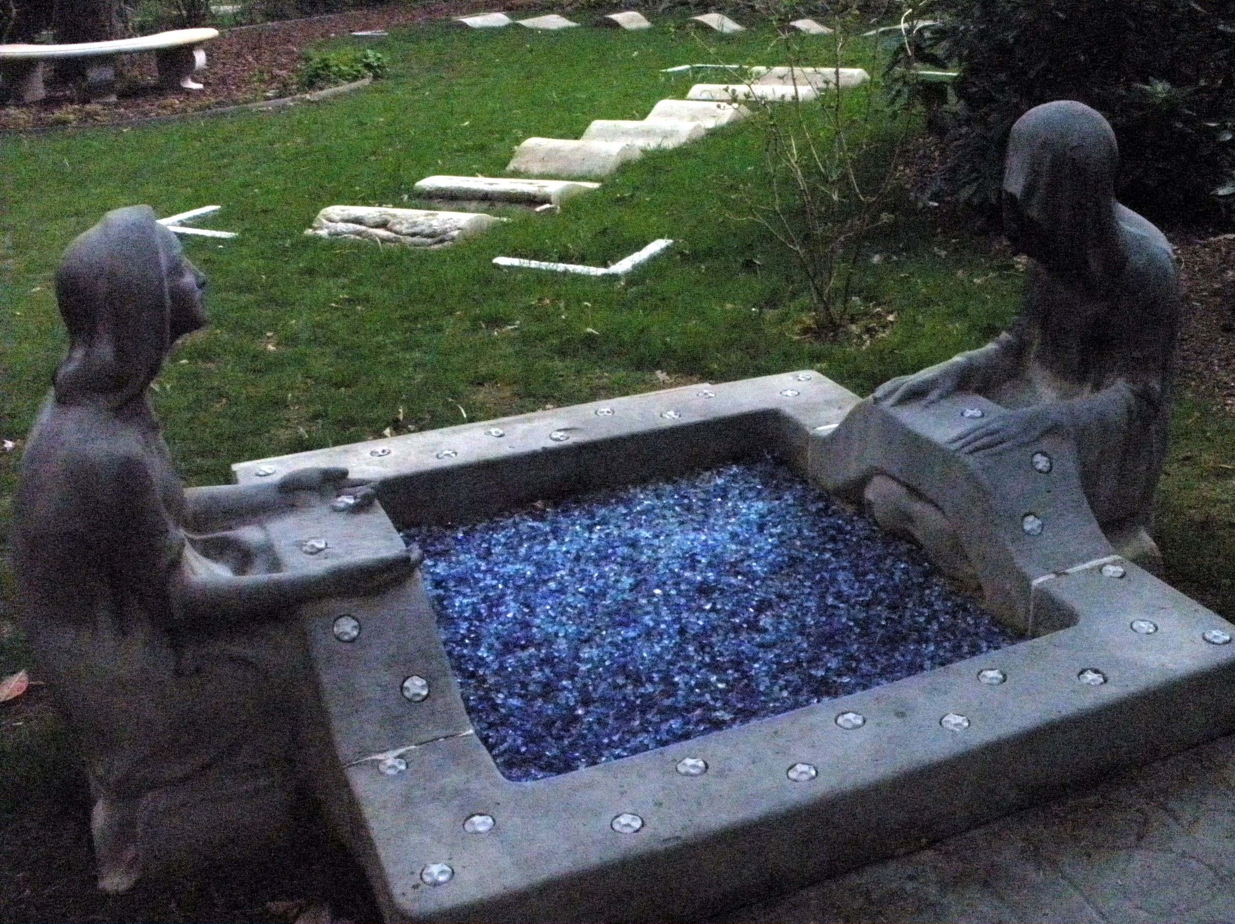 Historisches Sandstein-Grabmal (1908) des Bildhauers Richard Luksch für das Hamburger Warburg-Kindermädchen Franziska Jahns im Bereich des Gartens der Frauen auf dem Ohlsdorfer Friedhof in Hamburg-Ohlsdorf.Ursprünglicher Standort: AG 24, 110-2 (Bereich Kapelle 7). Weitere Information bei Barbara Leisner, Heiko K. L. Schulze, Ellen Thormann: Der Hamburger Hauptfriedhof Ohlsdorf. Geschichte und Grabmäler, Verlag Hans Christians, Hamburg 1990, ISBN 3-7672-1060-6, Seite 80, Kat. 479, sowie fredriks.de].